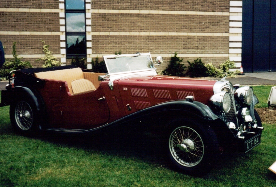 Triumph Gloria 6-Zylinder. Foto in England